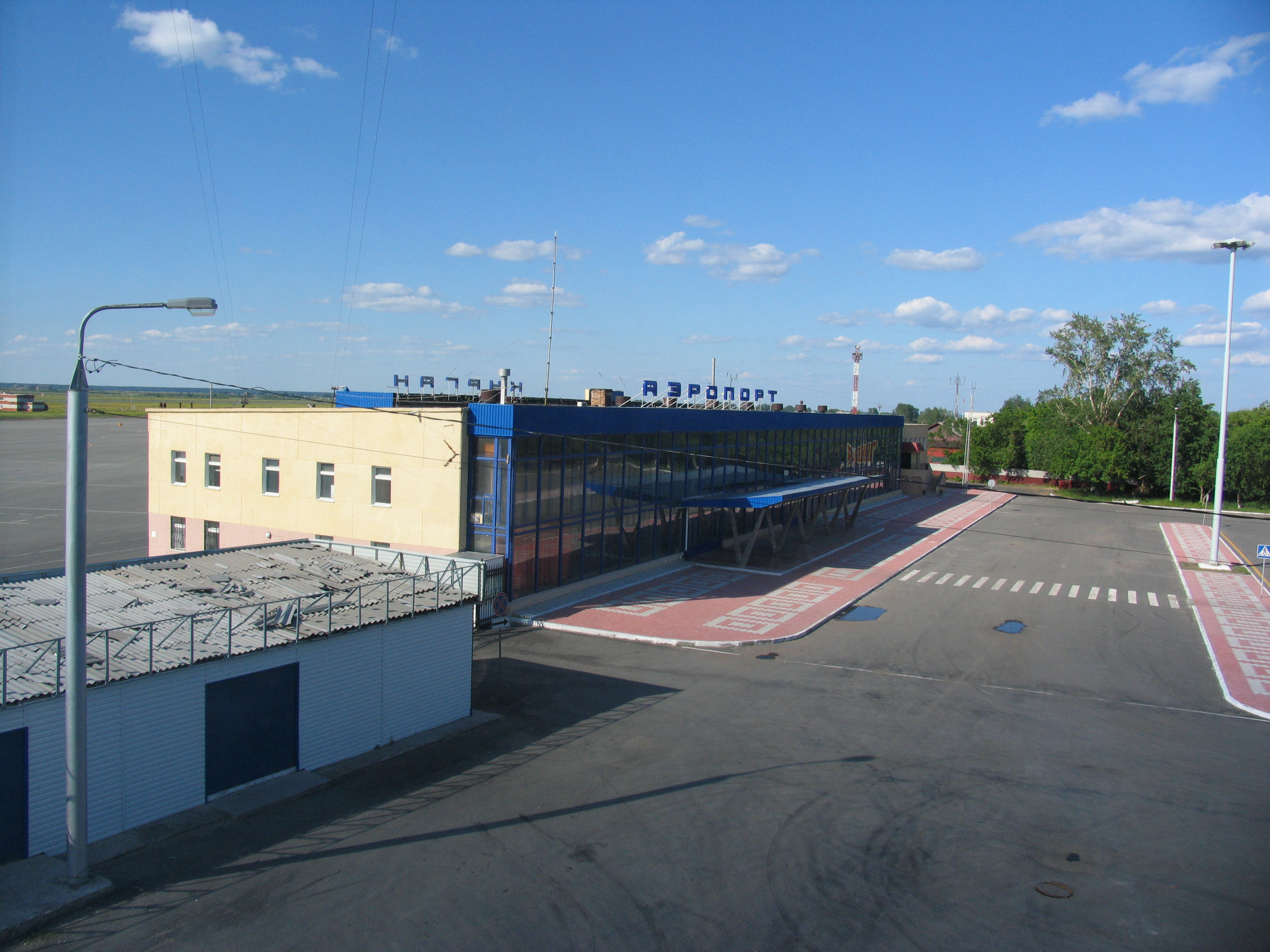 Курган. Аэропорт. День